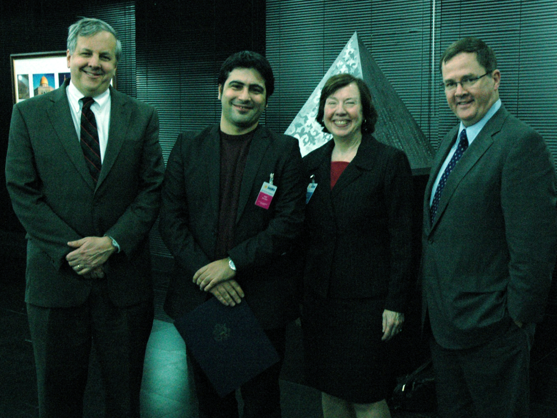 Azad Fikir Universiteti layihəsinə İnternetdə İfadə Azadlığı üzrə mükafatın təqdimatı / Soldan sağa: ABŞ-ın ATƏT-dəki səfiri İan Kelli, Azad Fikir Universiteti layihəsinin rəhbəri Vüqar Salamlı, ABŞ Helsinki komissiyasının məsləhətçisi, səfir Sintia Efrid və ABŞ dövlət katibi köməkçisinin demokratiya və insan hüquqları məsələləri üzrə müavini Tomas O. Melia.